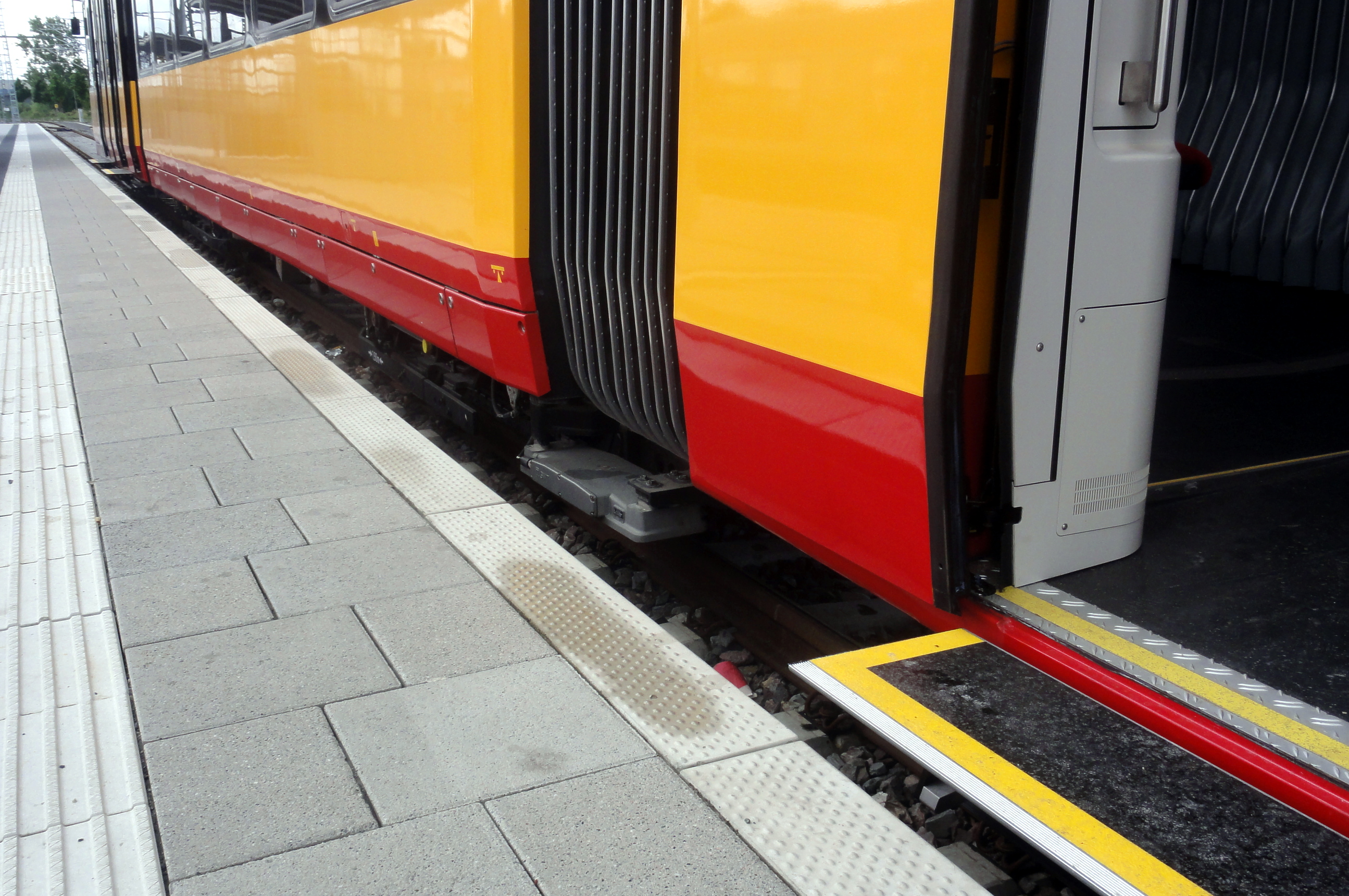 Schrägansicht des PZB-Fahrzeugmagneten eines ET2010, der an der Strassenbahnhaltestelle Neckarsulm Bahnhof steht.